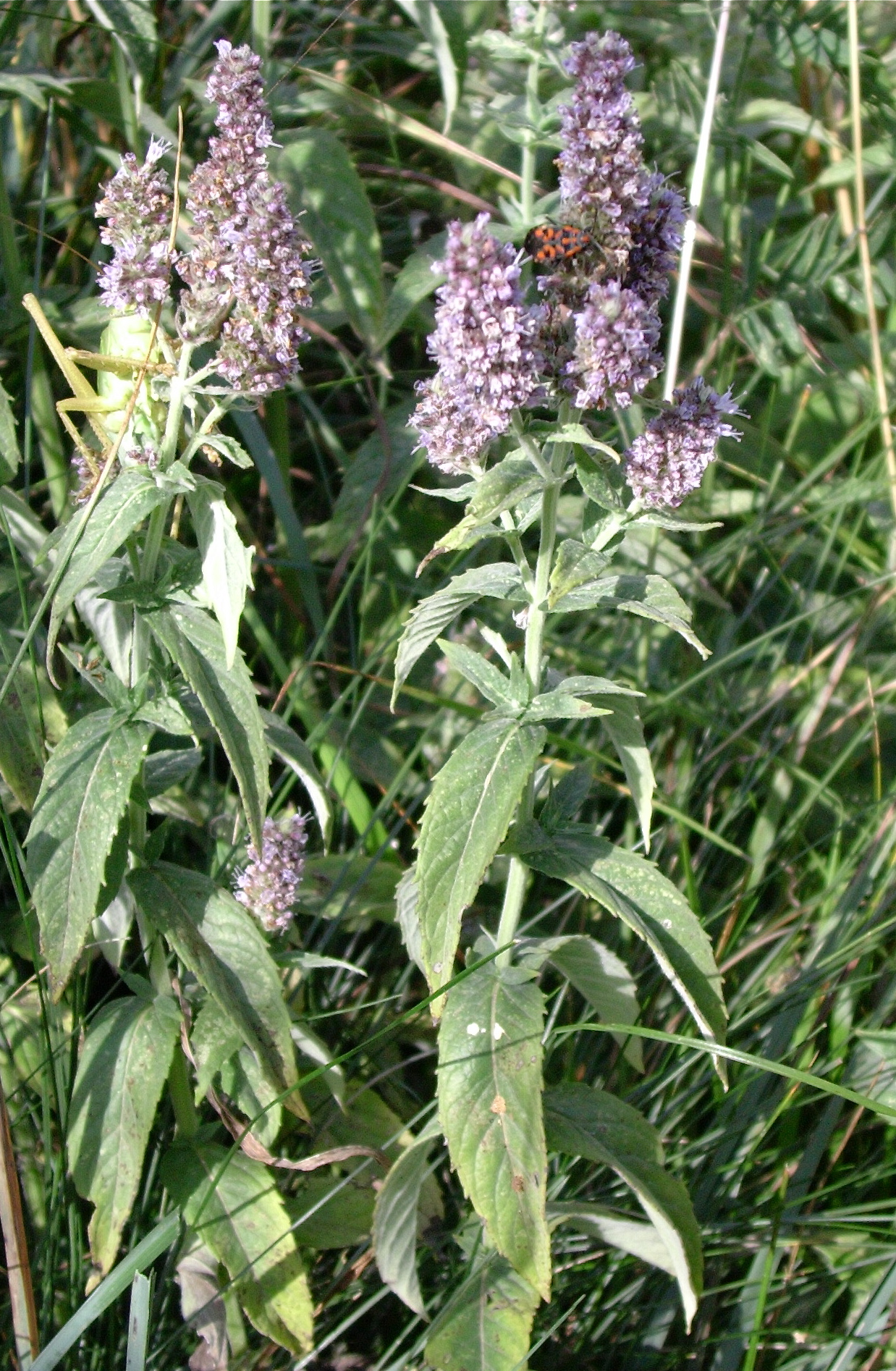 Menthe spicata, en épi